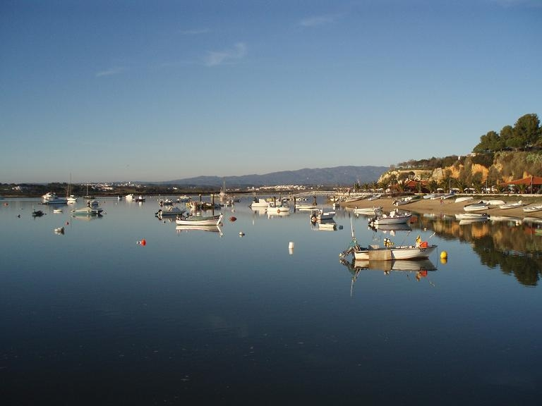 Alvor Riverside